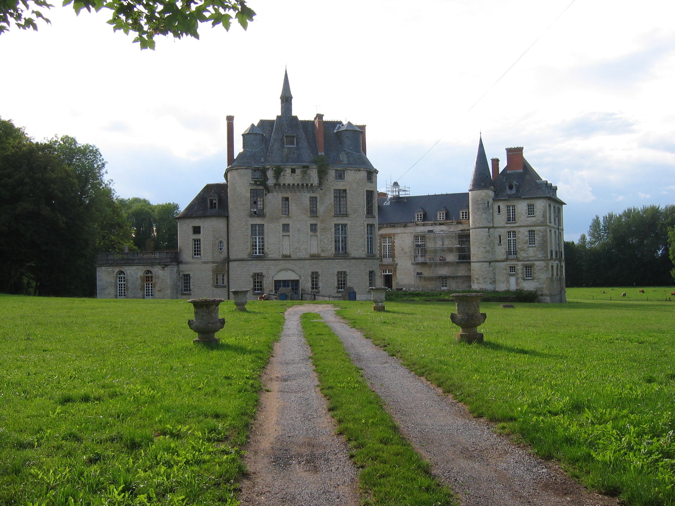 Château de Thugny-Trugny, en Ardennes, France